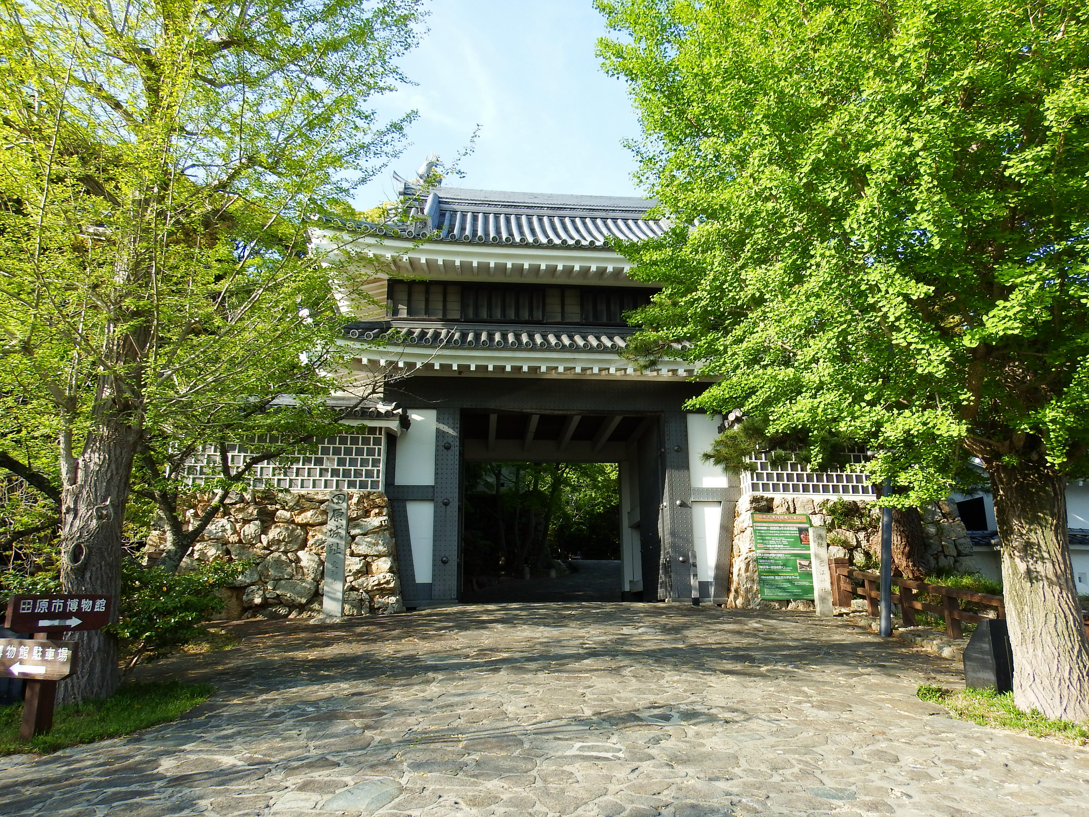 田原城跡・田原市博物館